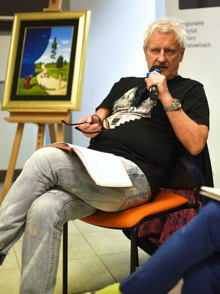 Rafał Olbiński, malarz, grafik, plakacista.